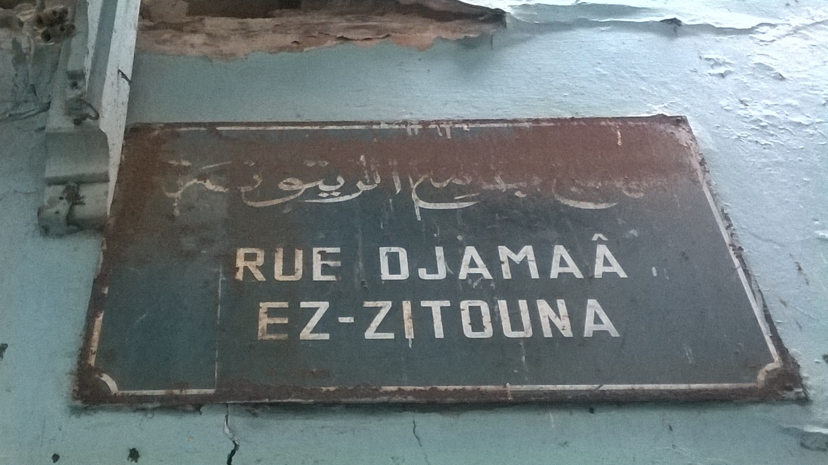 La médina de Tunis مدينة تونس العتيقة